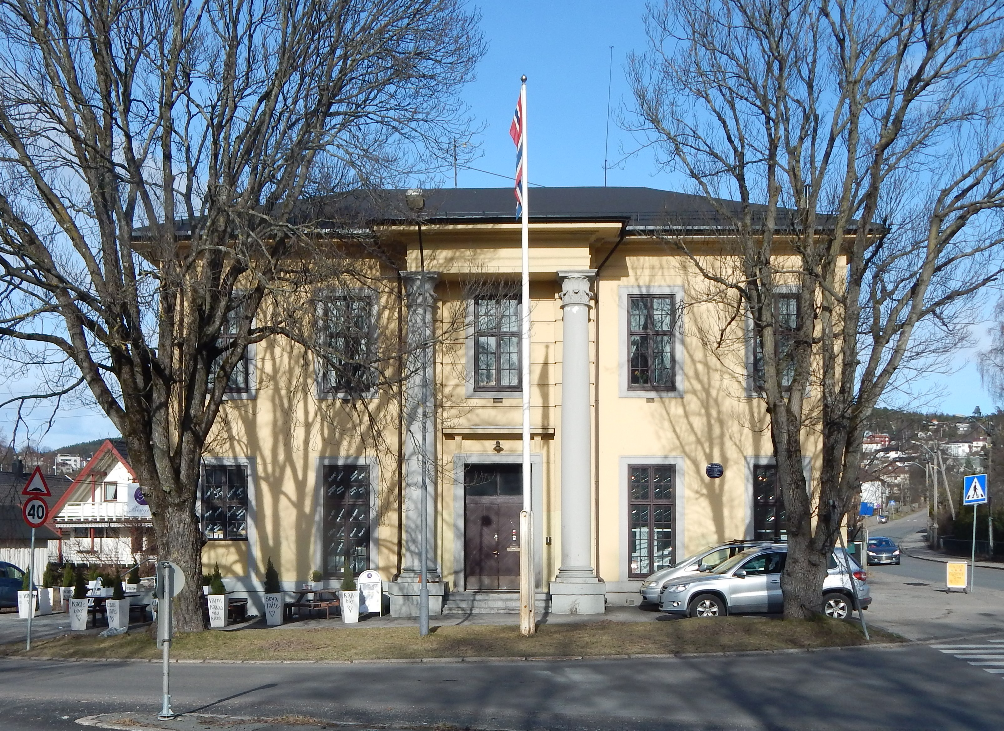 Kjelsåsveien 18, også kalt «Svetter'n»